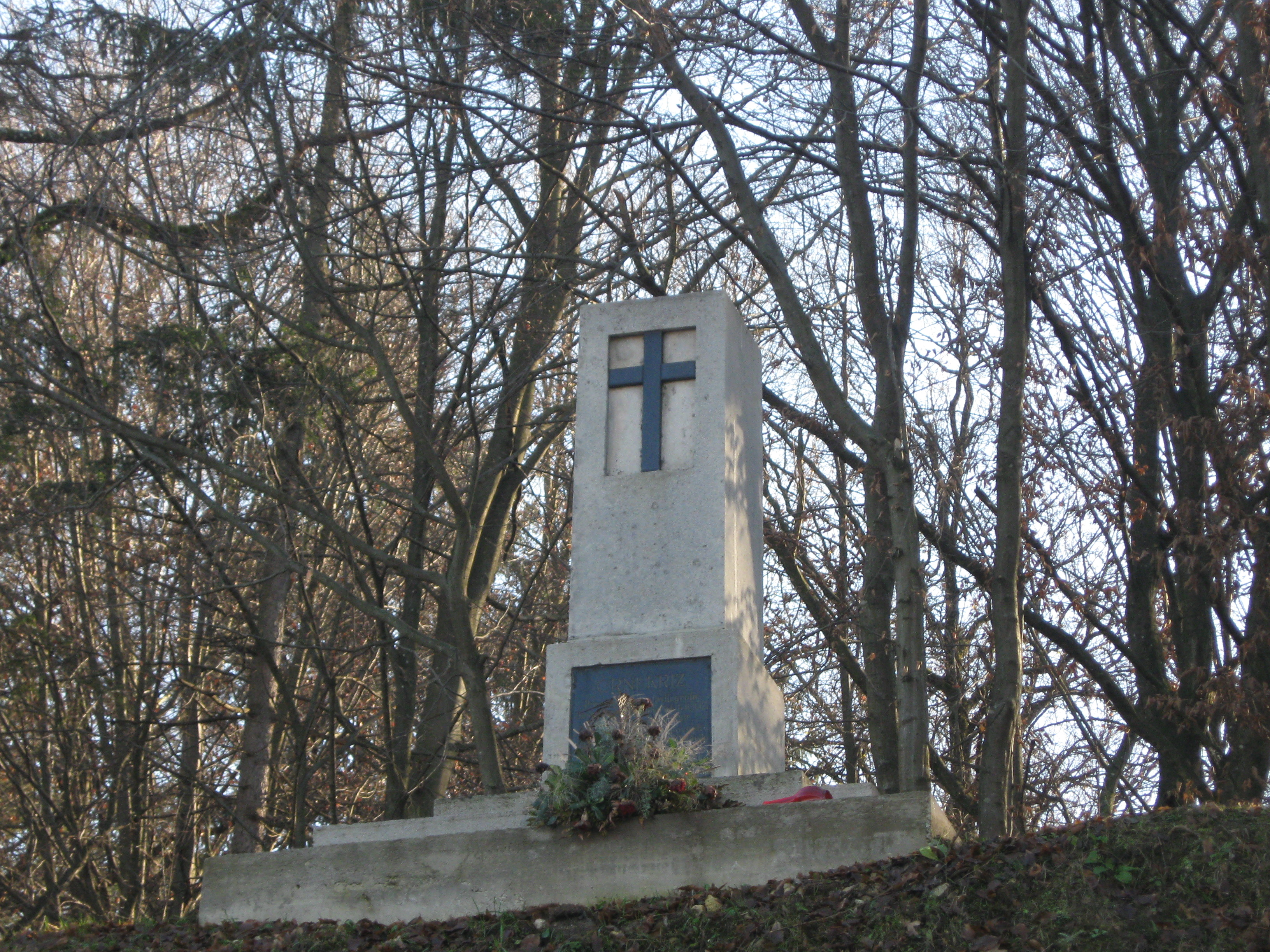 Znamenje Črni Križ pri Hrastovcu v spomin na usmrtitev Agate.